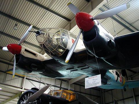 Spanischer Heinkel He 111 Lizenzbau CASA 2.111B Technik-Museum Sinsheim